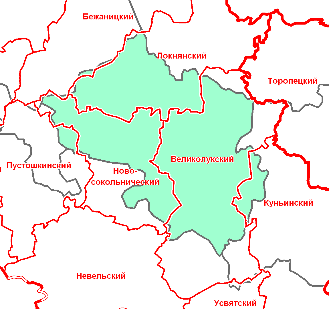 Великолукский уезд Псковской губернии в современной сетке районов